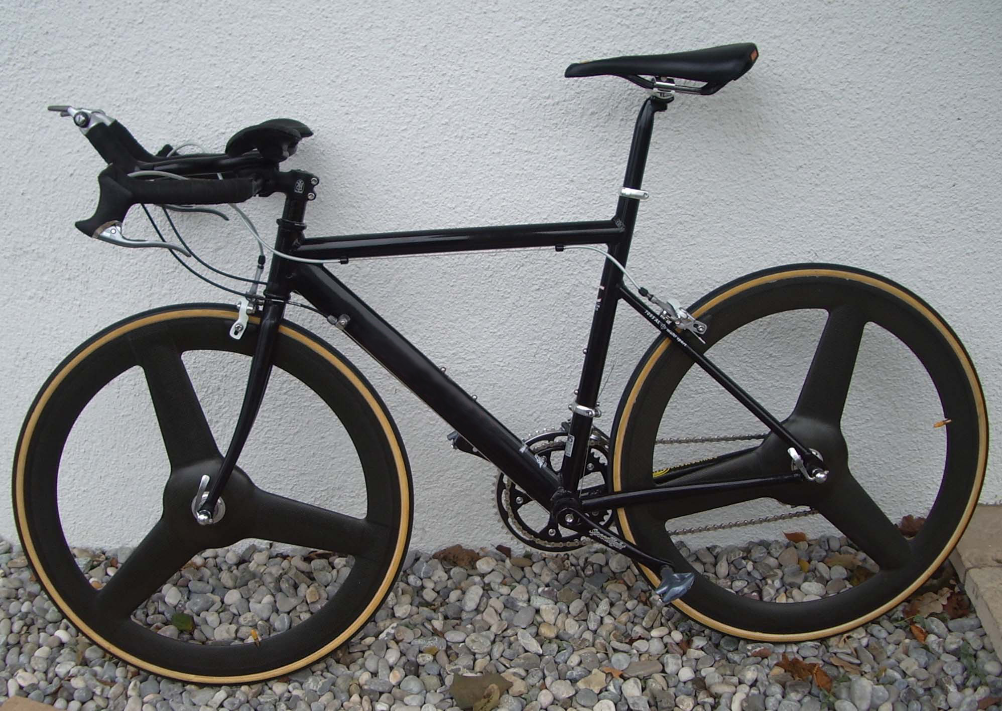 Triathlonrad